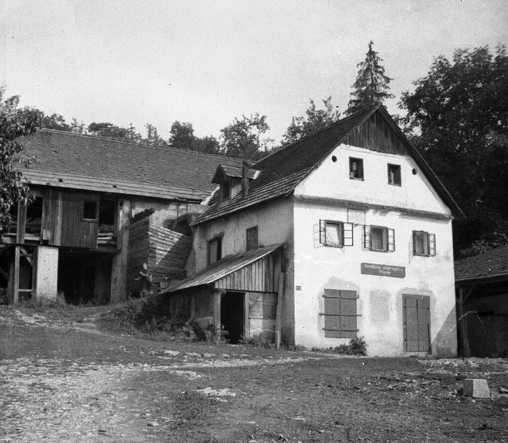 Žaga v Gornjem Vrhpolju (levo žaga, desno stanovanjska hiša, spodaj zadruga), Gor. Vrhpolje.